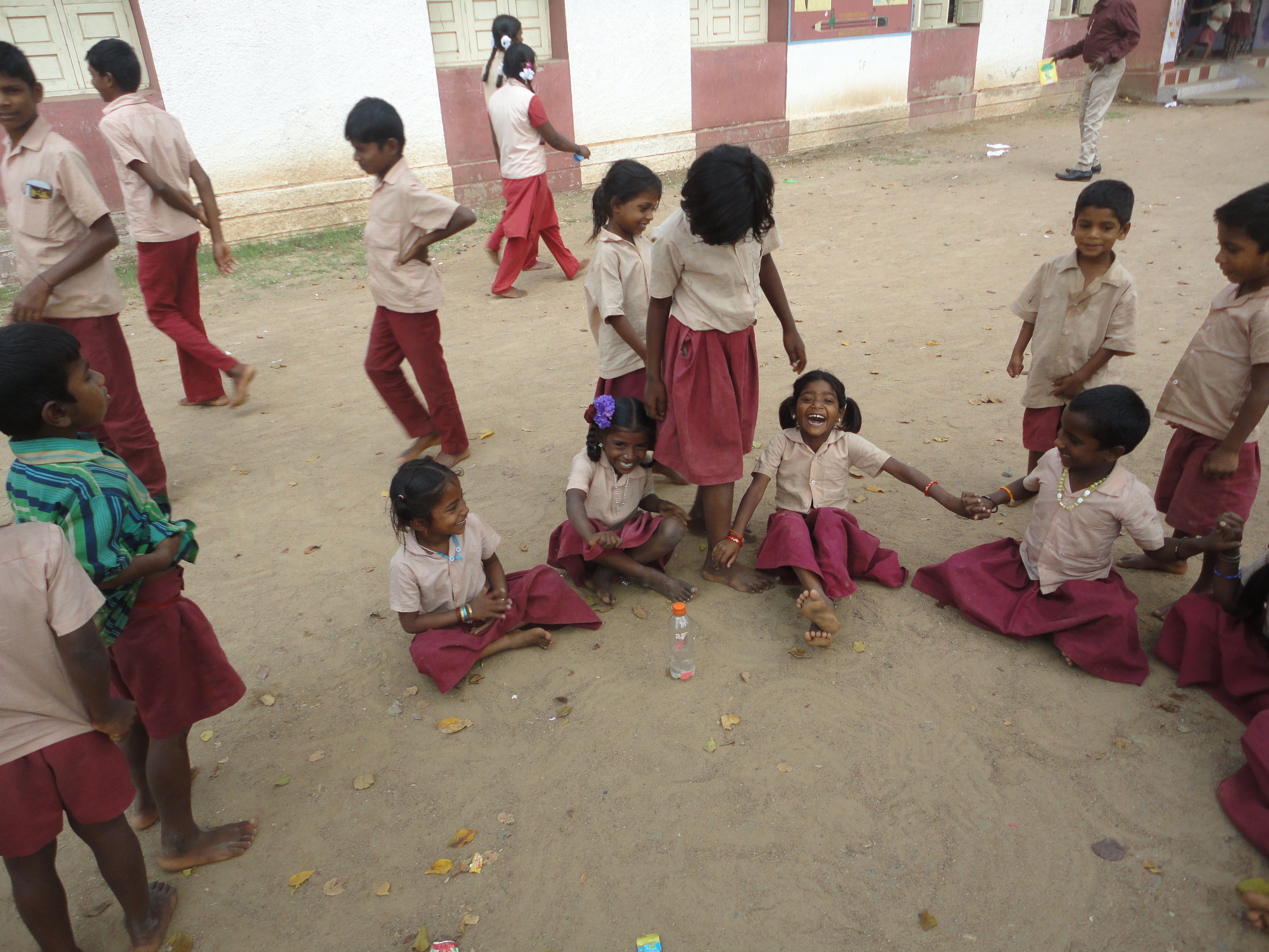 பள்ளியில் குழந்தைகள் விளையாடுதல்